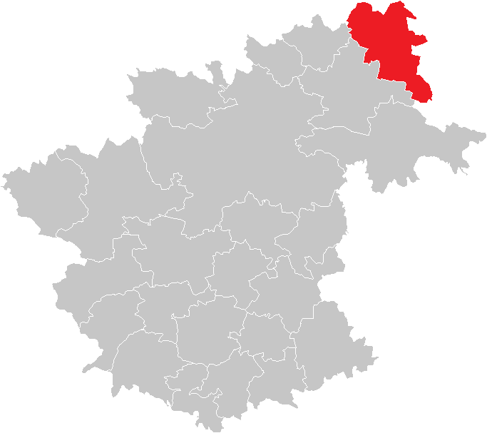 Bezirk Zwettl